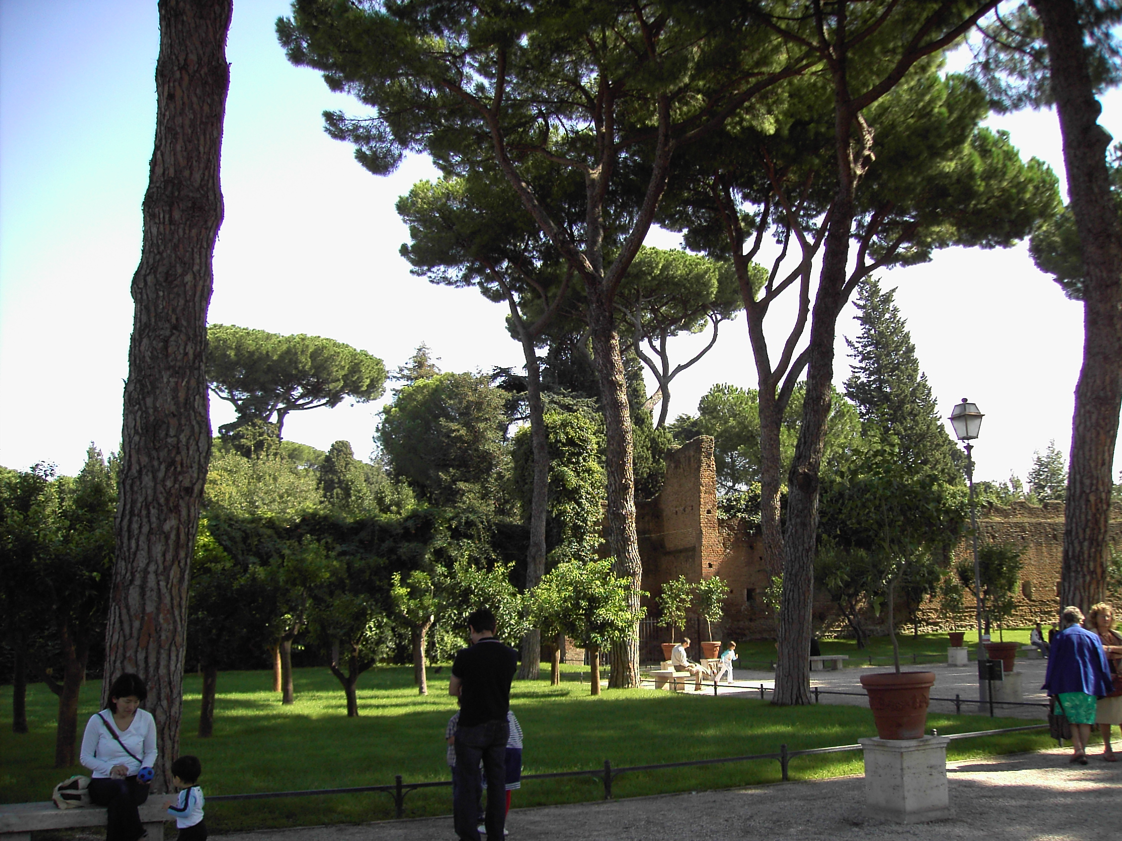 Roma, Giardino degli Aranci con le mura della Rocca Savella.